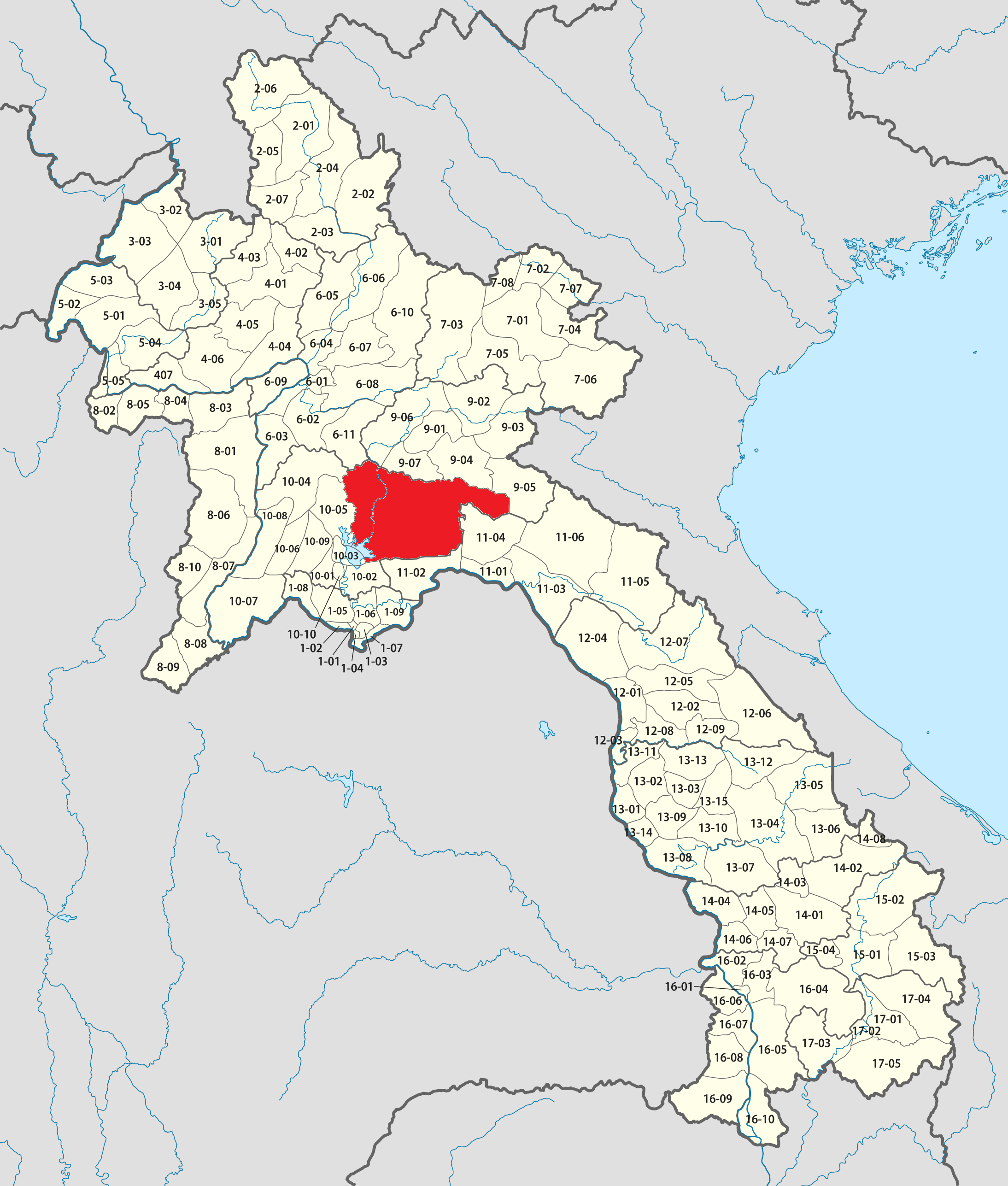 サイソムブーン県（Xaisomnoun Province）の地図。